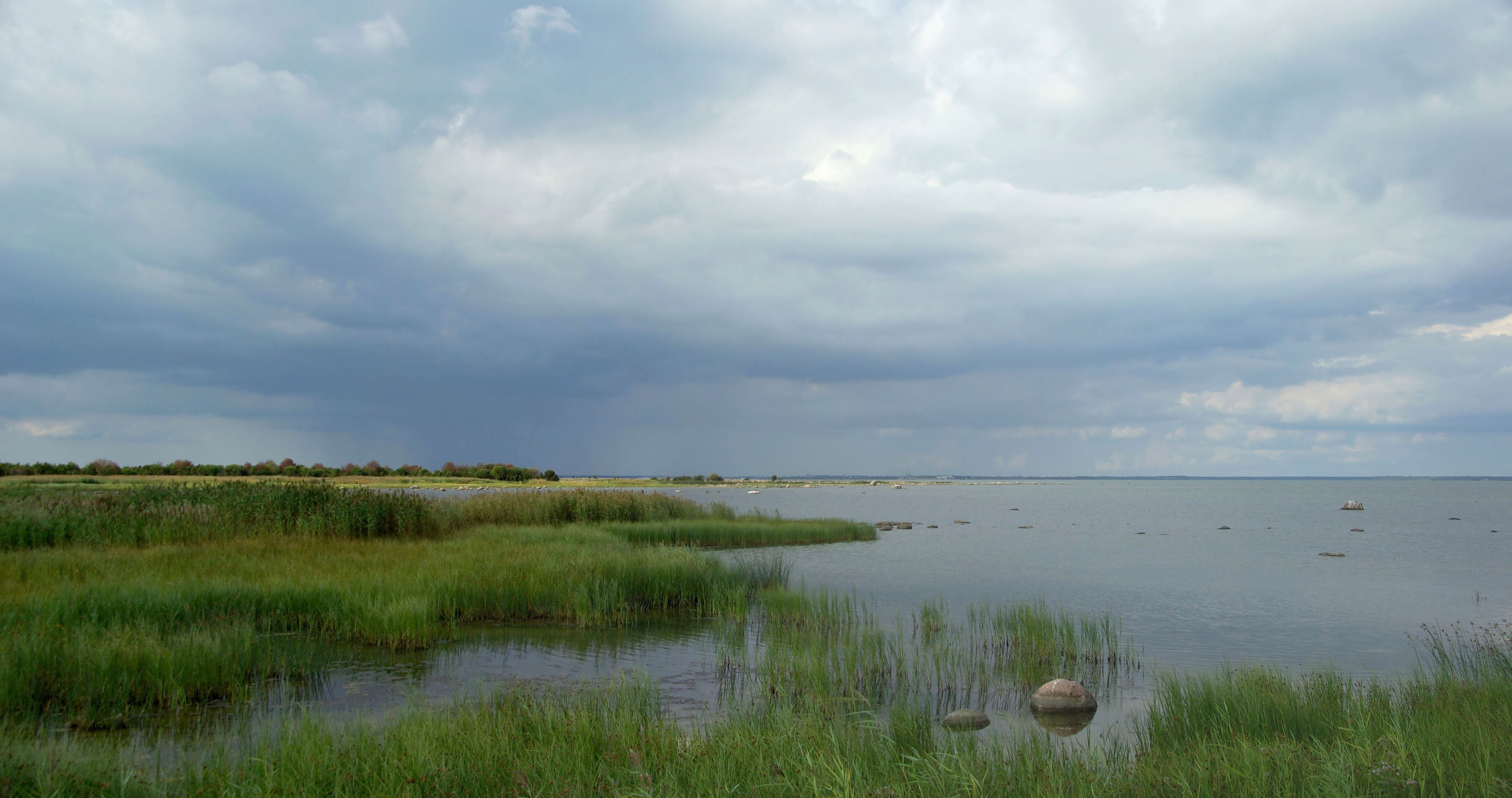 Abruka on 8,8 km² suurune saar Liivi lahes Saaremaa lõunaranniku lähedal Kaarma vallas Roomassaarest 4 kilomeetrit lõunas.